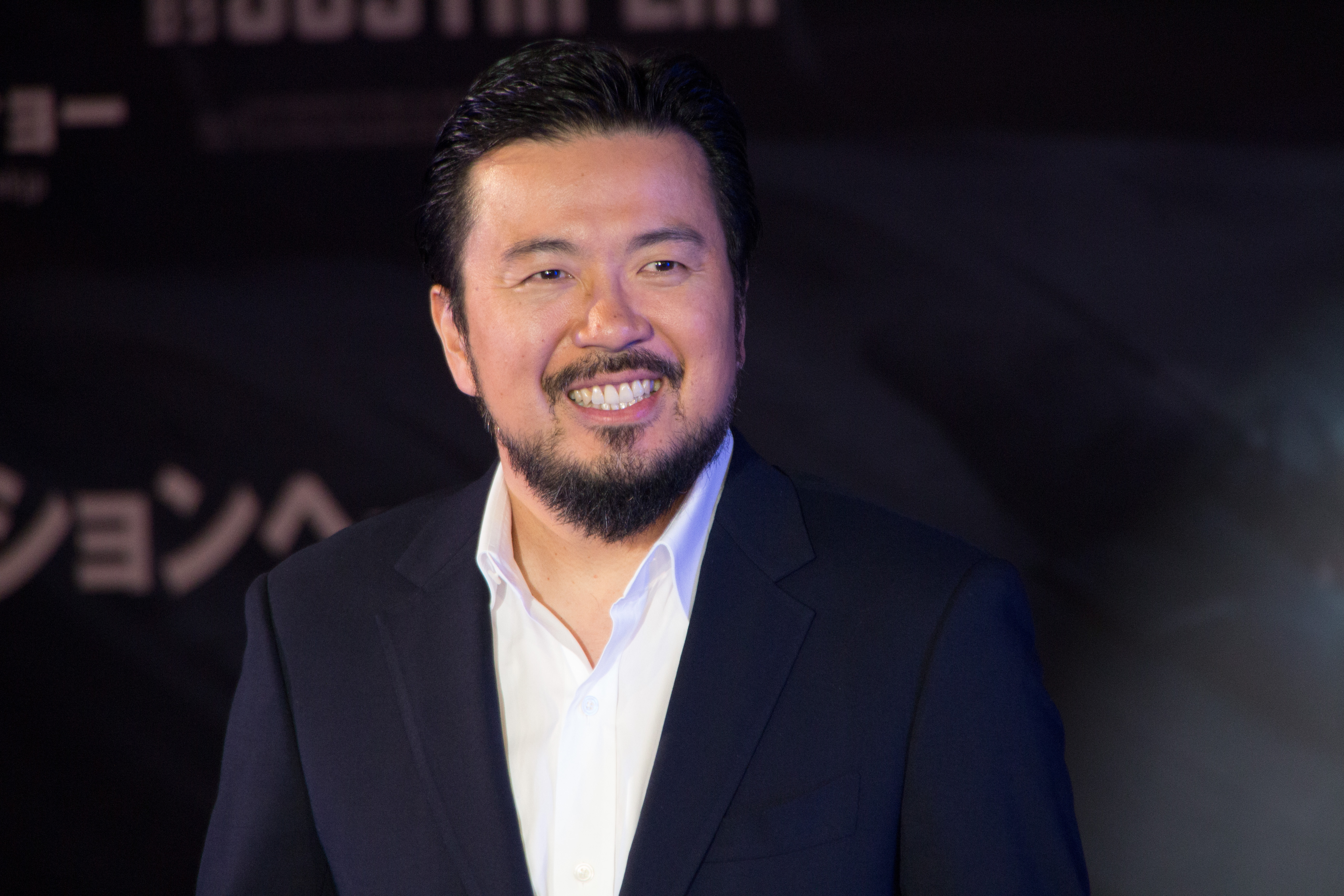 スター・トレック BEYOND ジャパン・プレミア レッドカーペット ジャスティン・リン